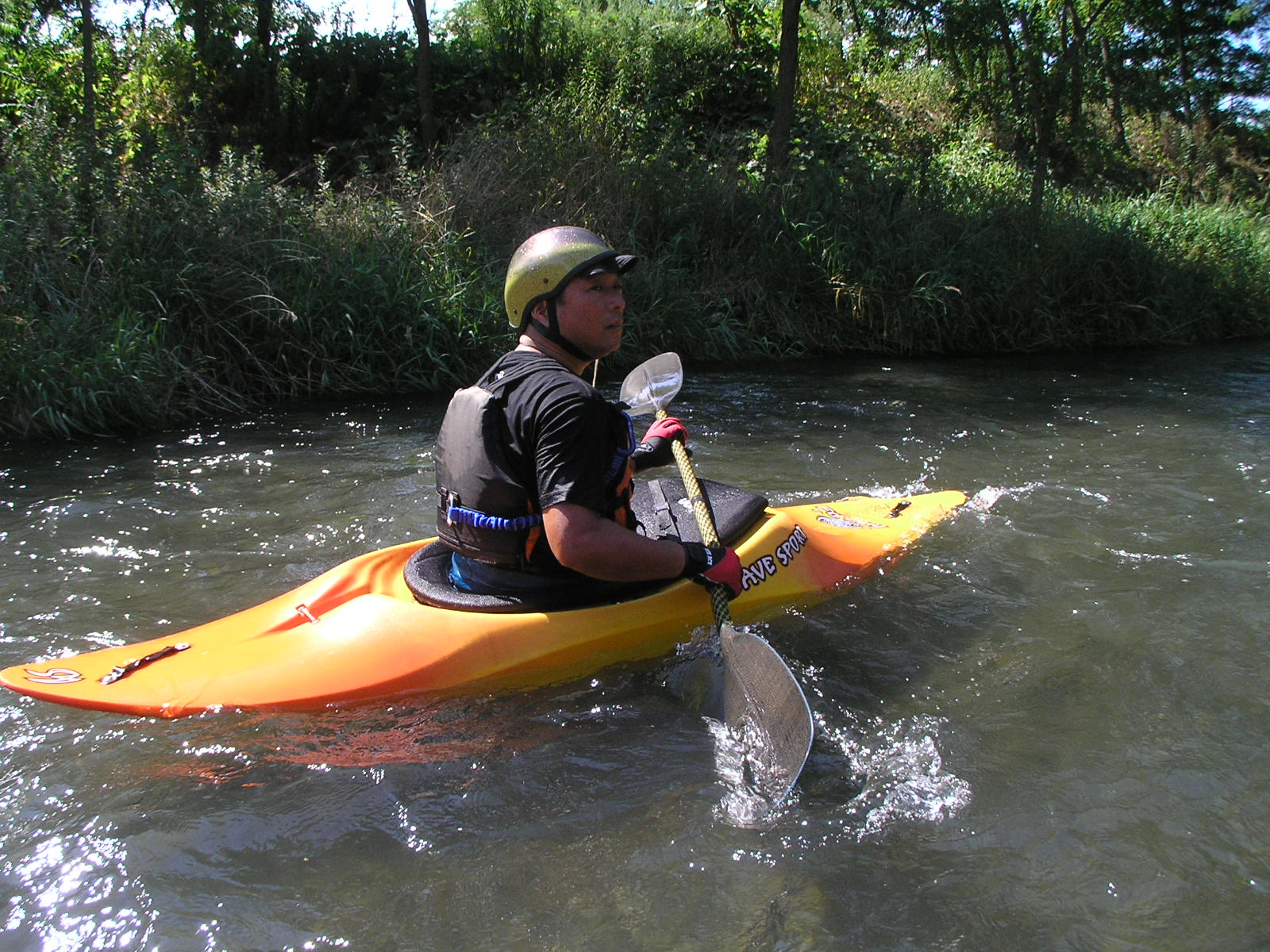 2007-08-13 Yorozui-River Canoe touring 万水川カヌーツーリング（カナディアンカヌー＆カヤック）